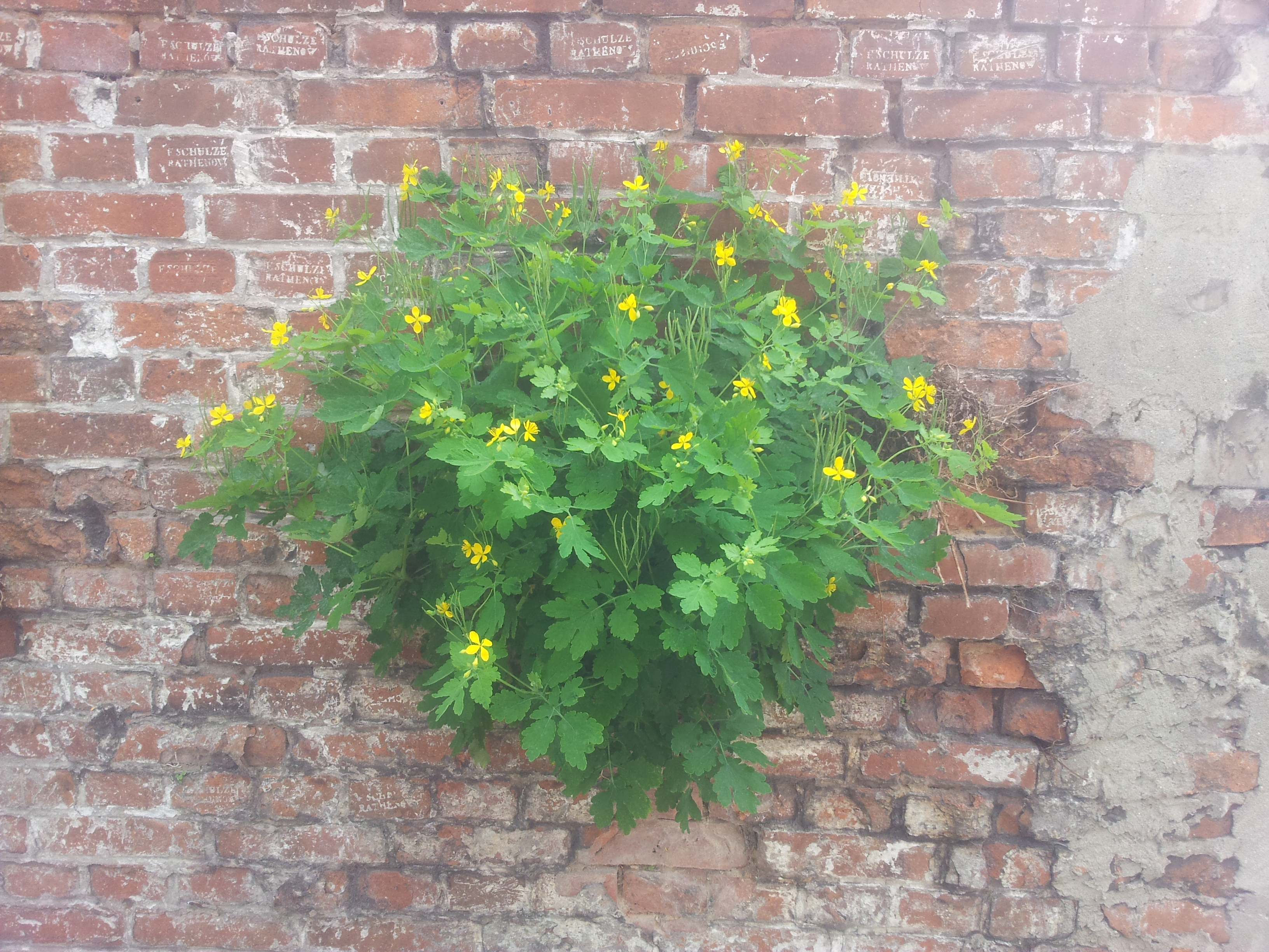 Mauer mit Schöllkraut TU23 3.Hof